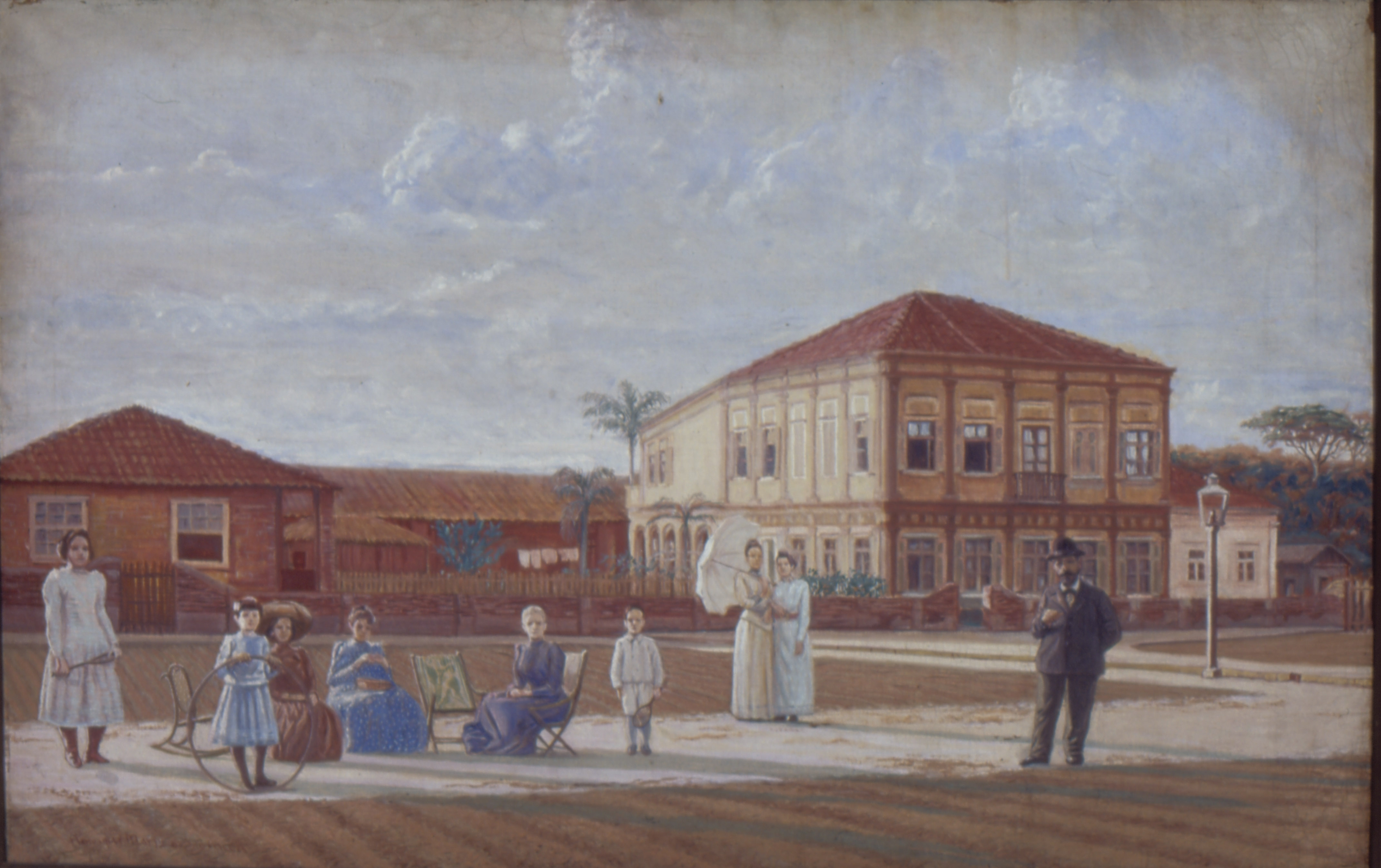 Obra que integra o acervo do Museu Paulista da USP. Coleção Fundo Museu Paulista - FMP